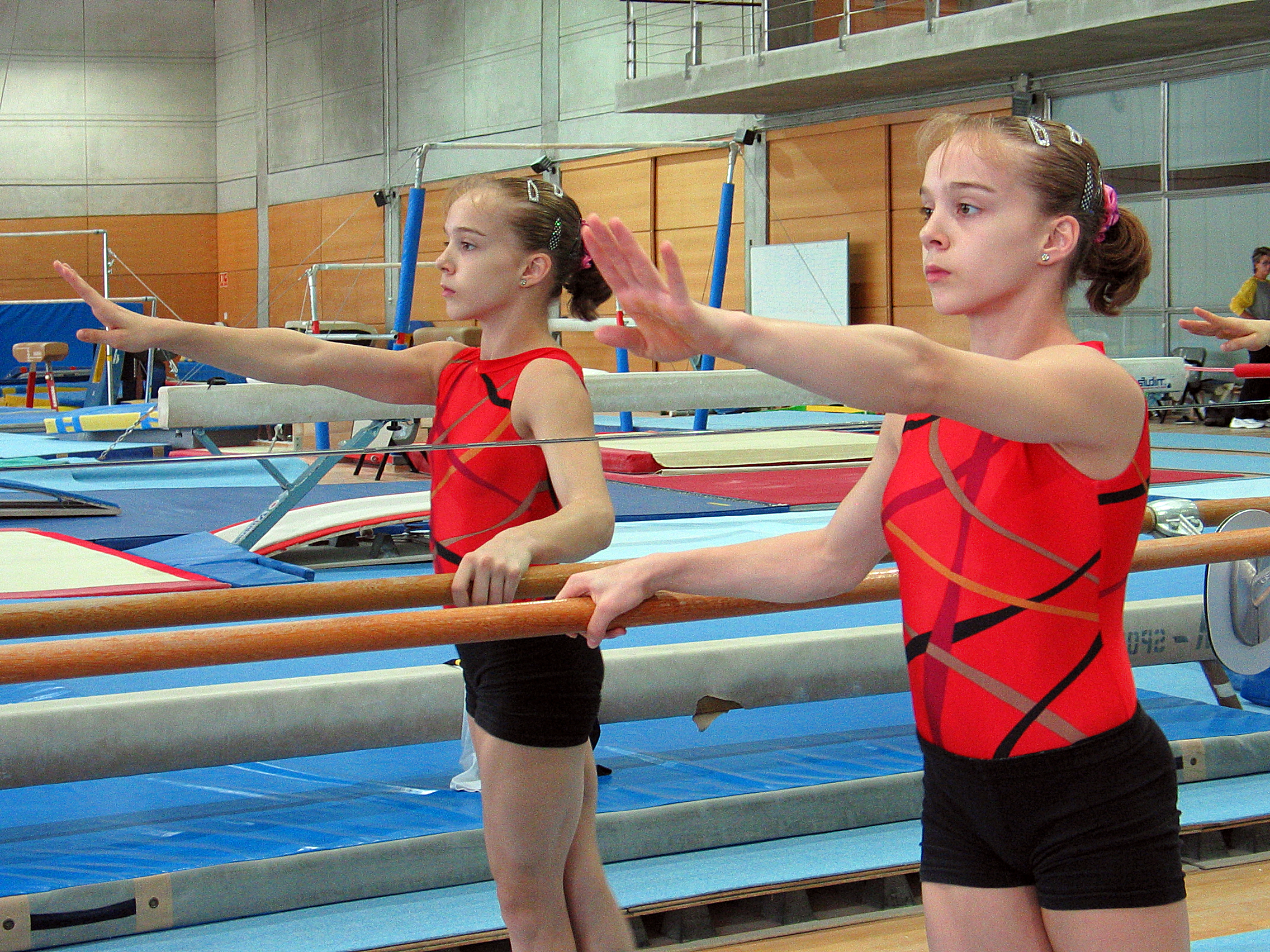 Elena Gómez en el CAR de Madrid el 20 de octubre de 2003.